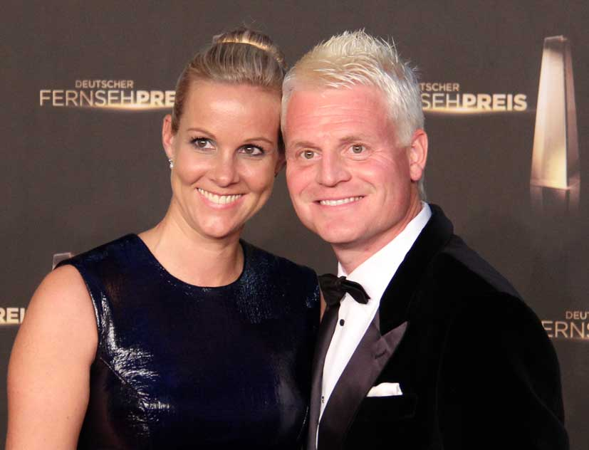 Guido Cantz mit Begleitung beim Deutschen Fernsehpreis 2012